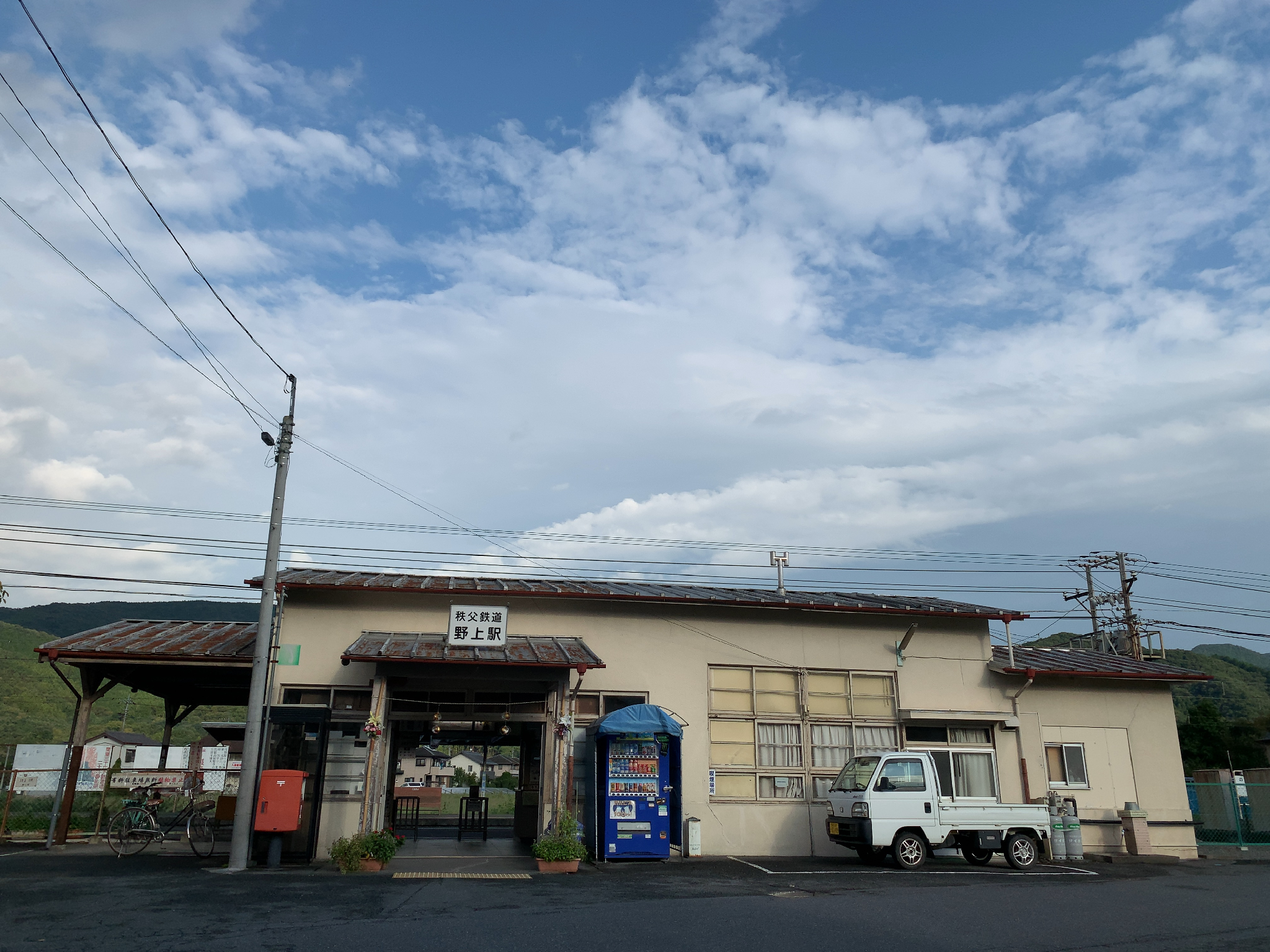 秩父鉄道 野上駅 駅舎